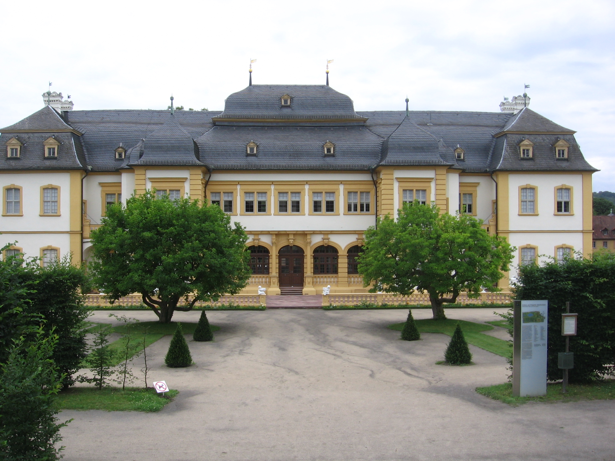 Schloss Veitshöchheim